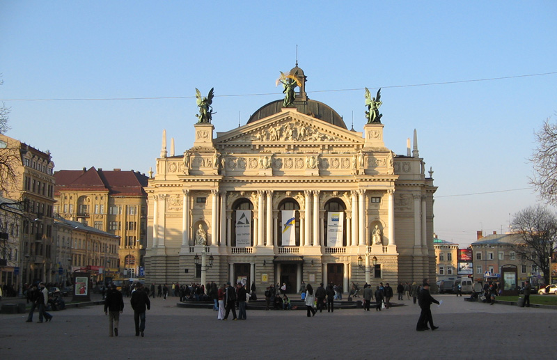 Lviv opera